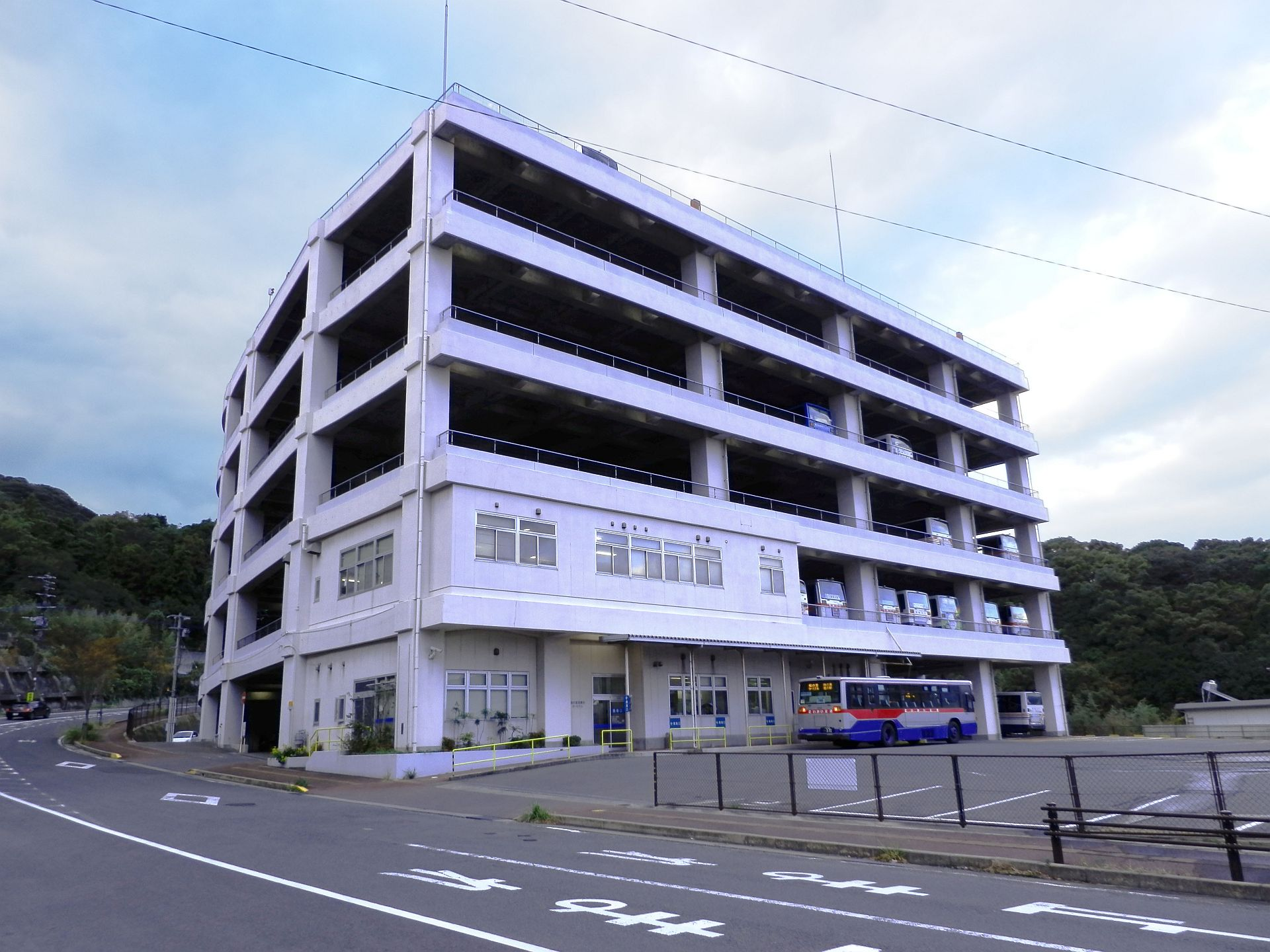 長崎バス桜の里ターミナル正面